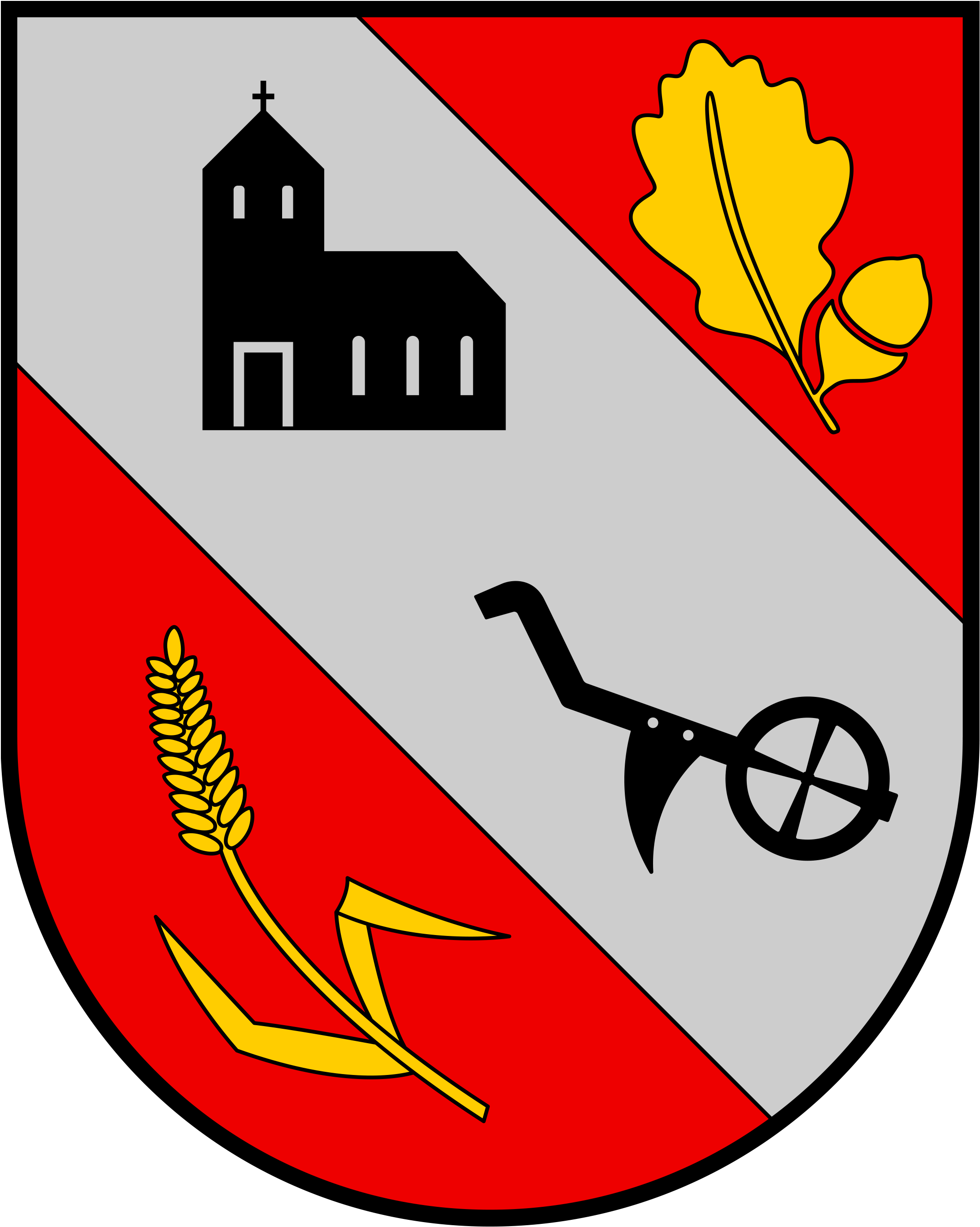 Blasonierung: "Rot geteilt durch silbernen Schrägrechtsbalken, dieser belegt mit schwarzer Kapelle mit drei silbernen Fenstern, Turm rechts mit zwei silbernen Schalllöchern und silbergerahmtem Eingang, links davon ein schwarzer Pflug, vorne eine goldene Ähre am zweiblättrigem Halm, hinten ein goldenes Eichenblatt mit Eichel am Stengel."